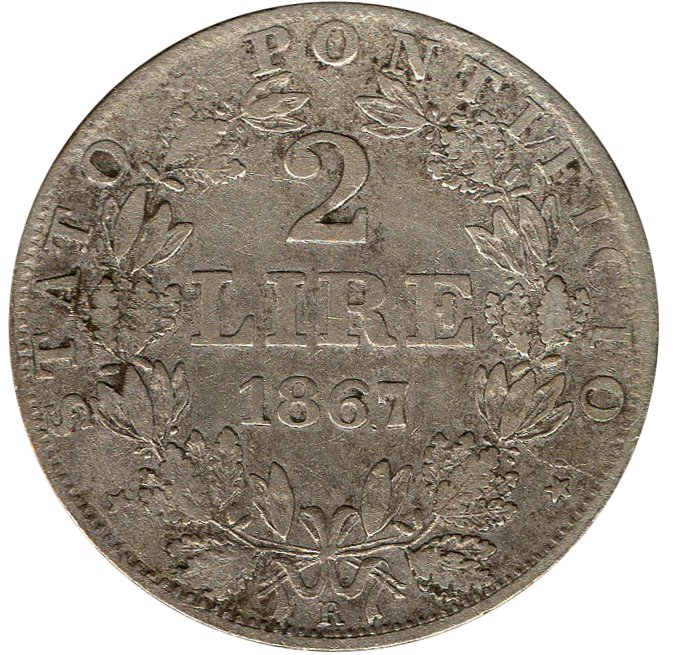 Pièce de 2 Lire du Vatican de 1867 avec le pape Pie IX